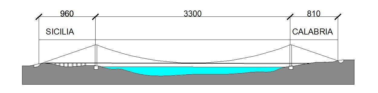 Sezione longitudinale del Ponte sullo Stretto di Messina